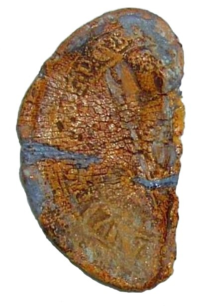 Bulla Krzywoustego odkryta w miejscowości Głębokie, gm. Kiszkowo (2002). Pochodzi z XII w. Przechowywana w zbiorach Muzeum Archeologicznego w Poznaniu (Polska).